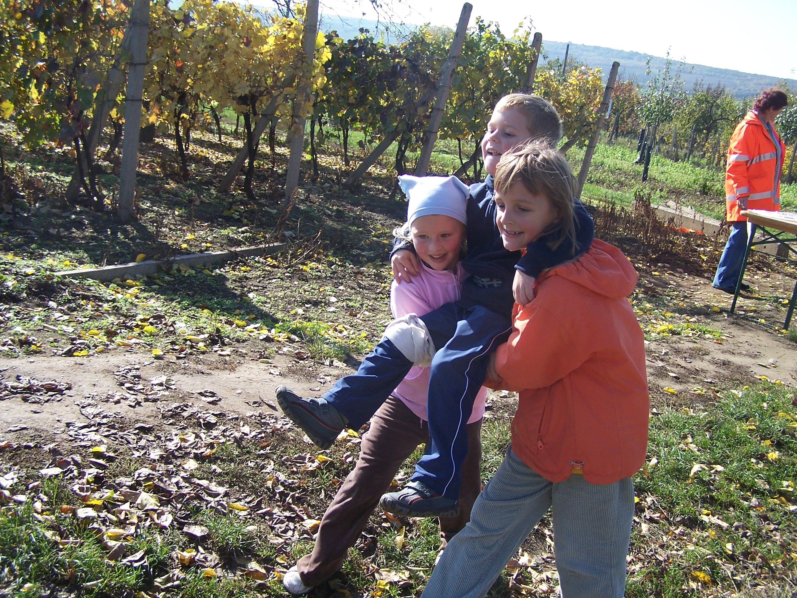 Základy zdravovědy při závodu požárnické všestrannosti